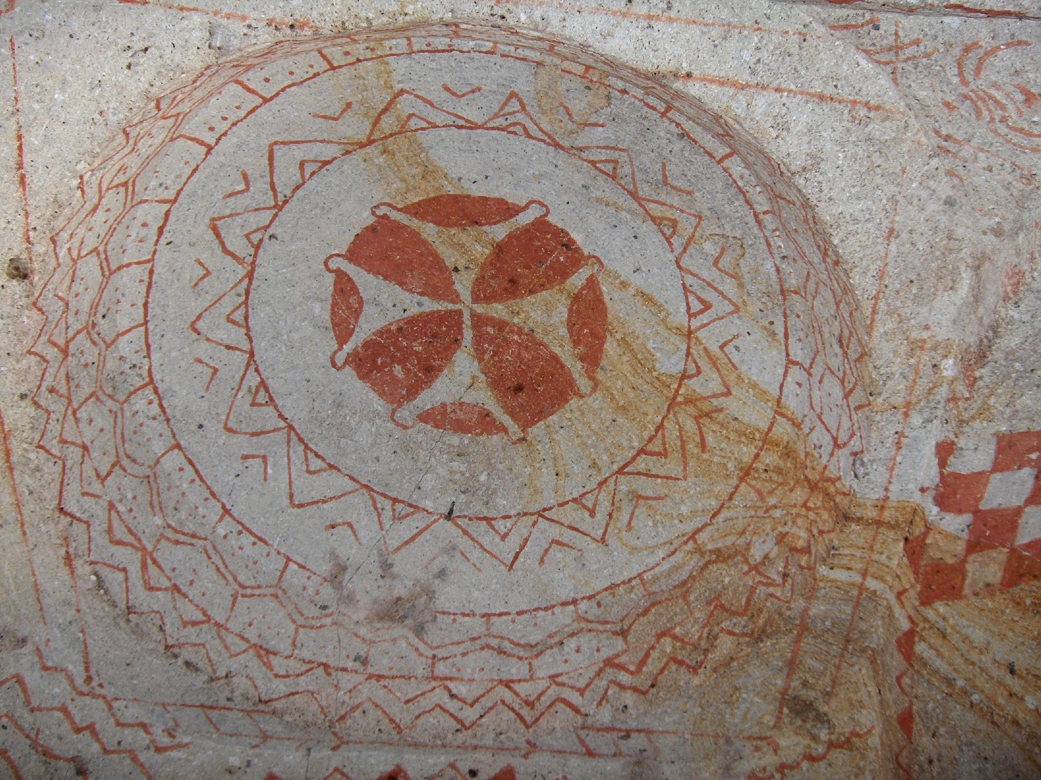 Göreme valley open air museum; Cappadocia, Turkey